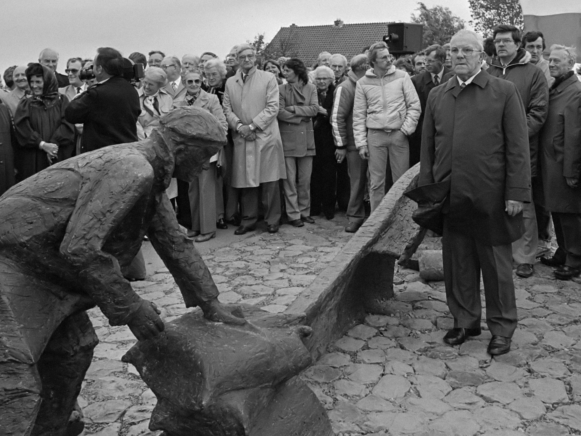 Monument met rechts schipper Evegroen 12 oktober 1983